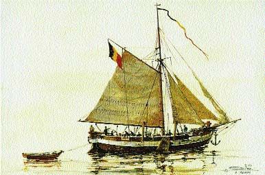 Canonnière de la Marine Royale belge (1831)